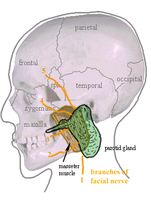 Parotid gland